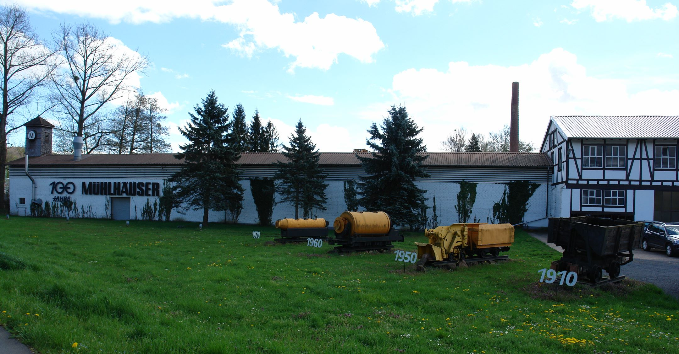 Mühläuser in Michelstadt